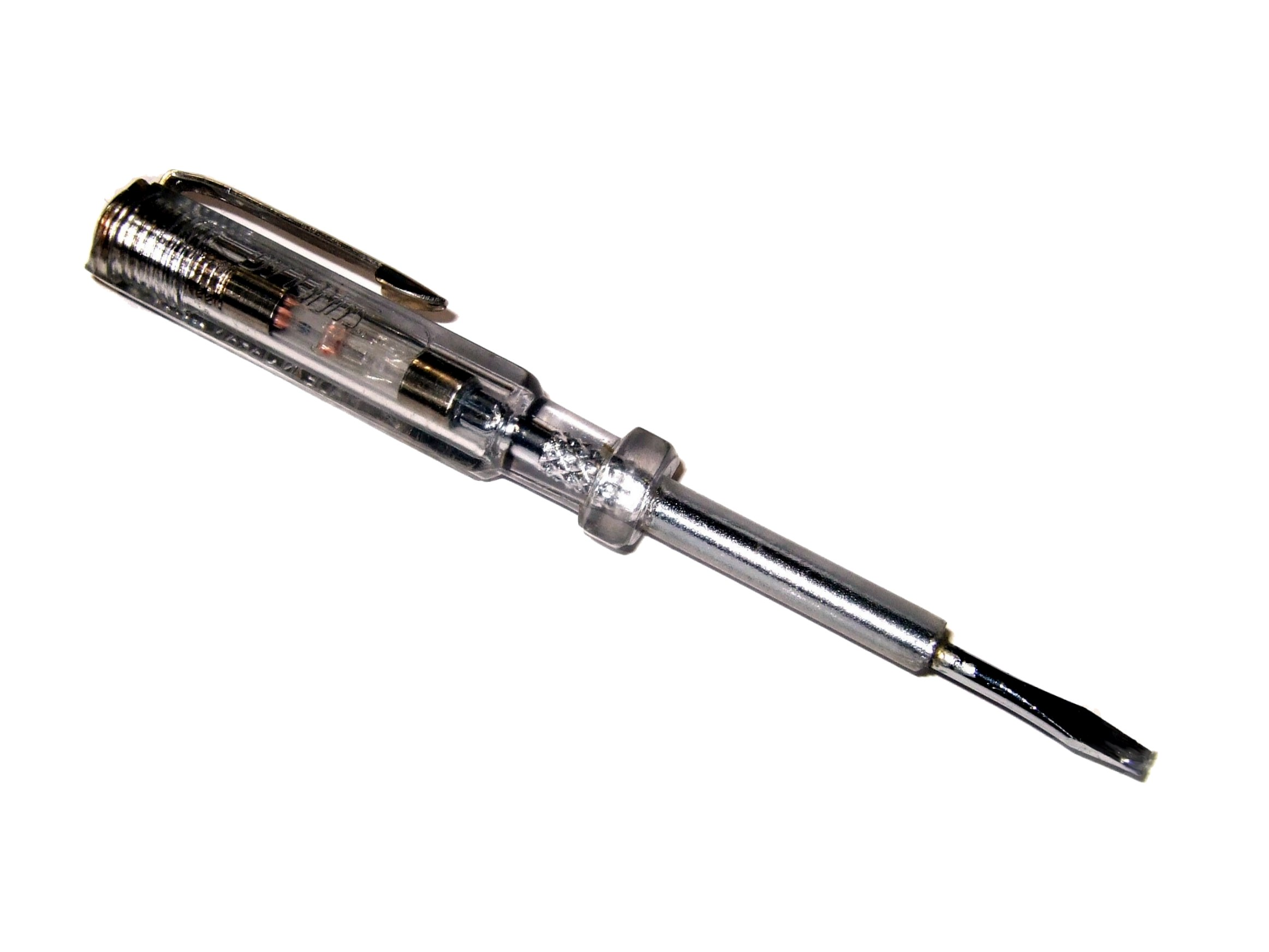 Kenden Driver. Photo taken in Tokyo Japan.